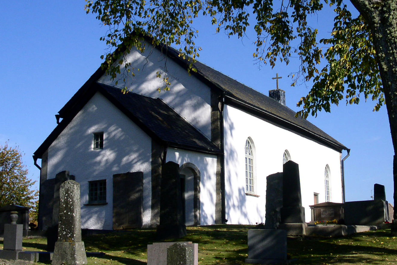 Lavad kyrka, Skara stift